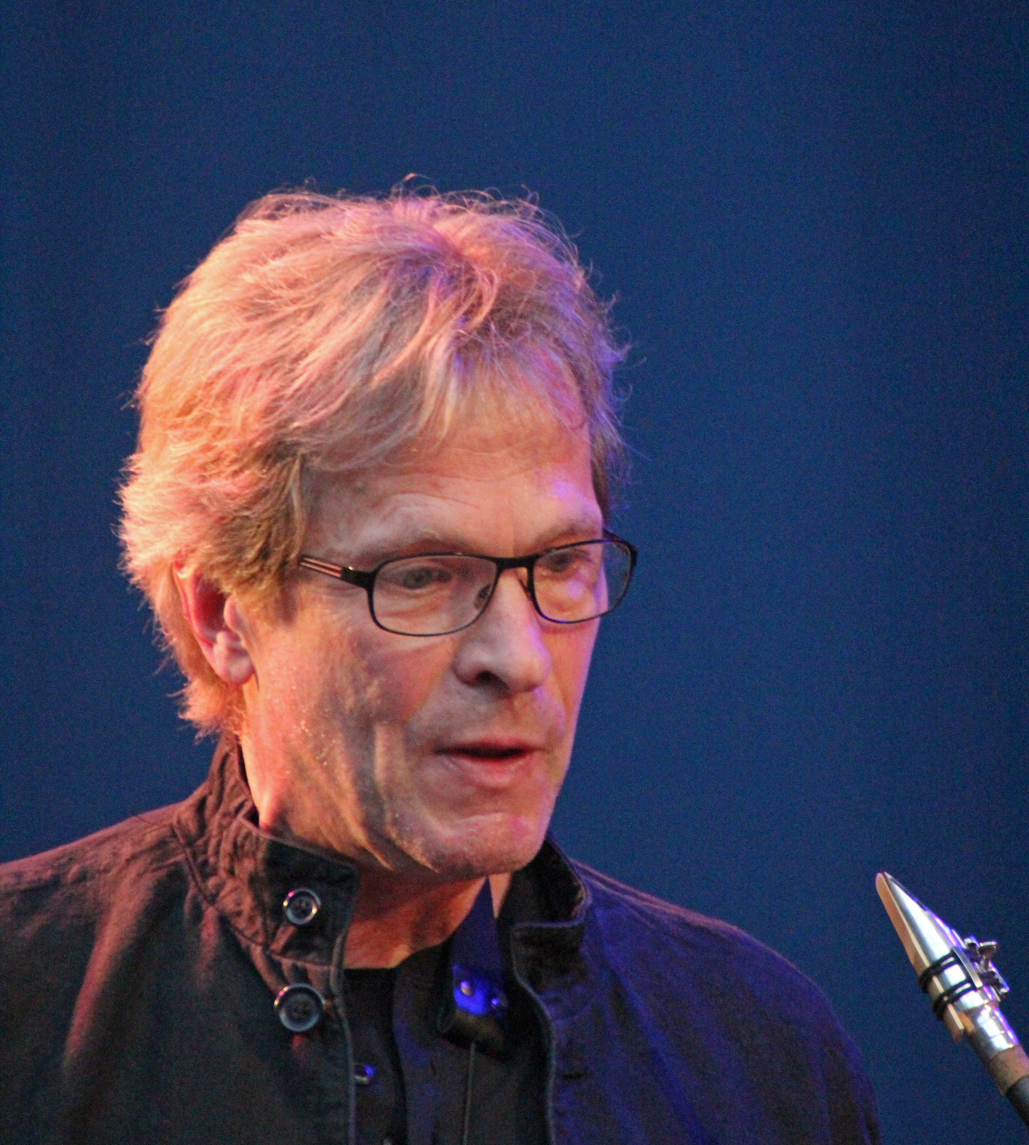 Bildinhalt: Christof Lauer bei einem Auftritt des Christof-Lauer-Trios im Frankfurter Palmengarten Aufnahmeort: Frankfurt am Main, Deutschland Die dargestellte Person wurde bei einem öffentlichen Auftritt fotografiert.